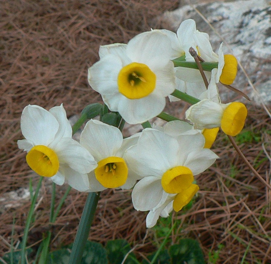 Narcissus נרקיס